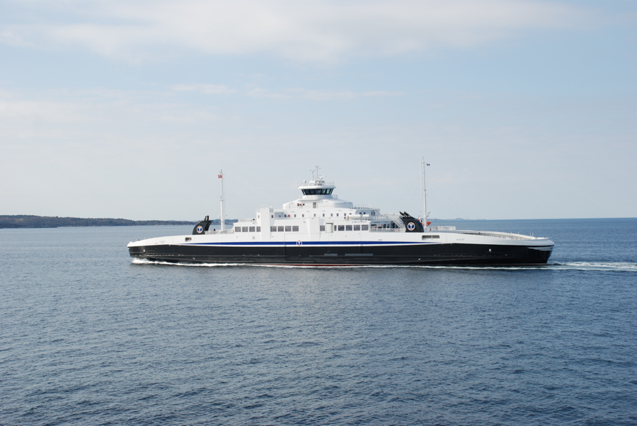 «Flatøy» på vei til Sandvikvåg 8. april 2019. Foto Harald Sætre